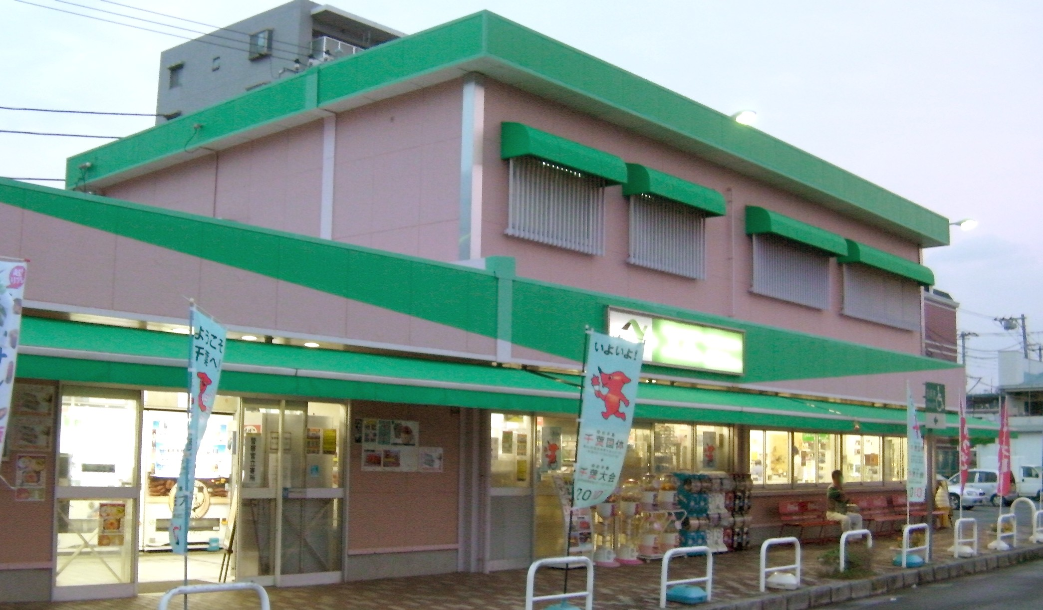 鬼高パーキングエリア下り線施設